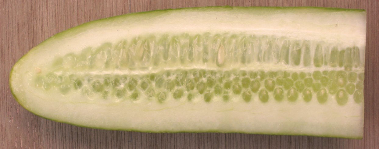 zelfgemaakte foto van komkommer lengtedoorsnede